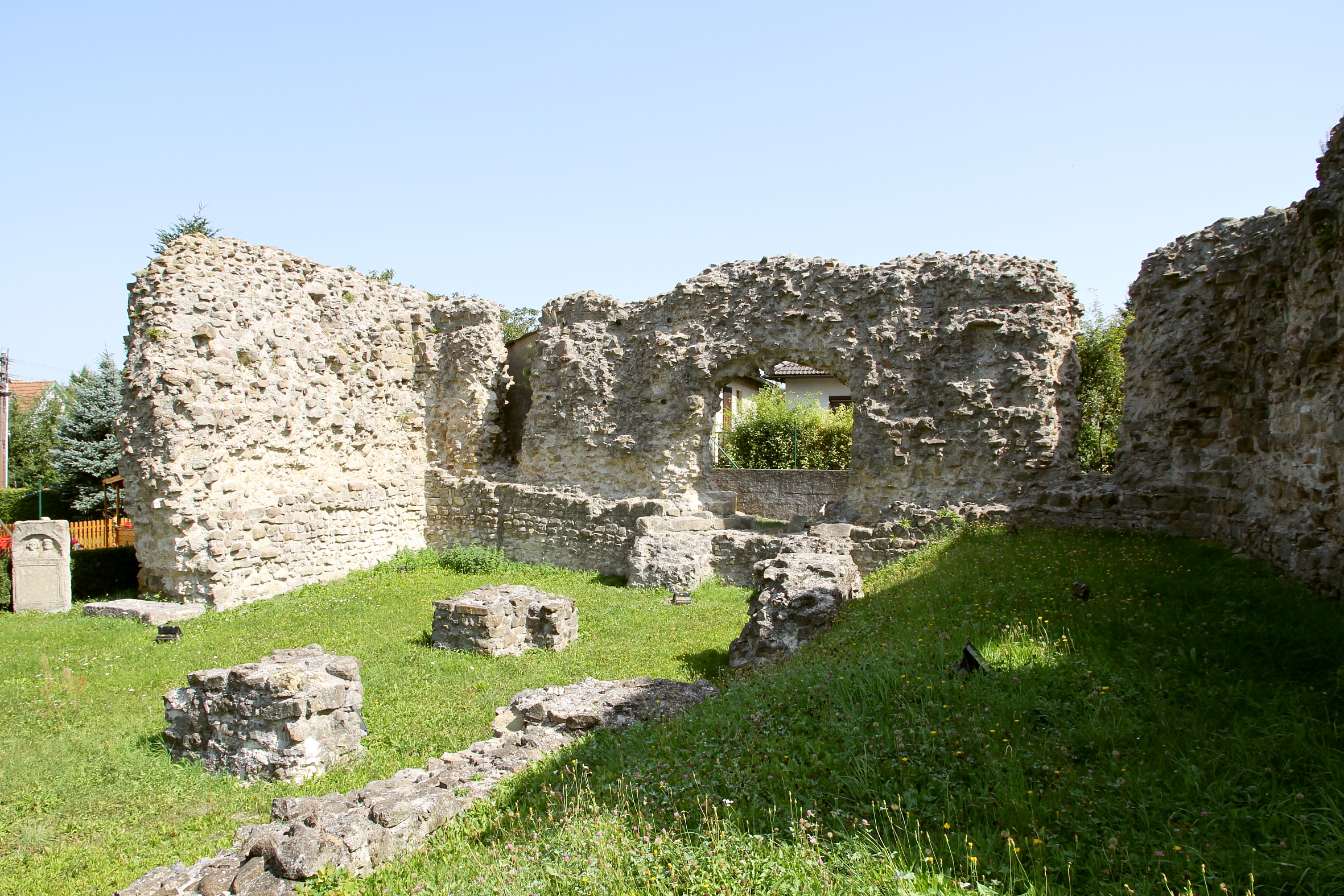 Das Kohortenkastell Cannabica in Zeiselmauer, eine Ortschaft in der niederösterreichischen Gemeinde Zeiselmauer-Wolfpassing.